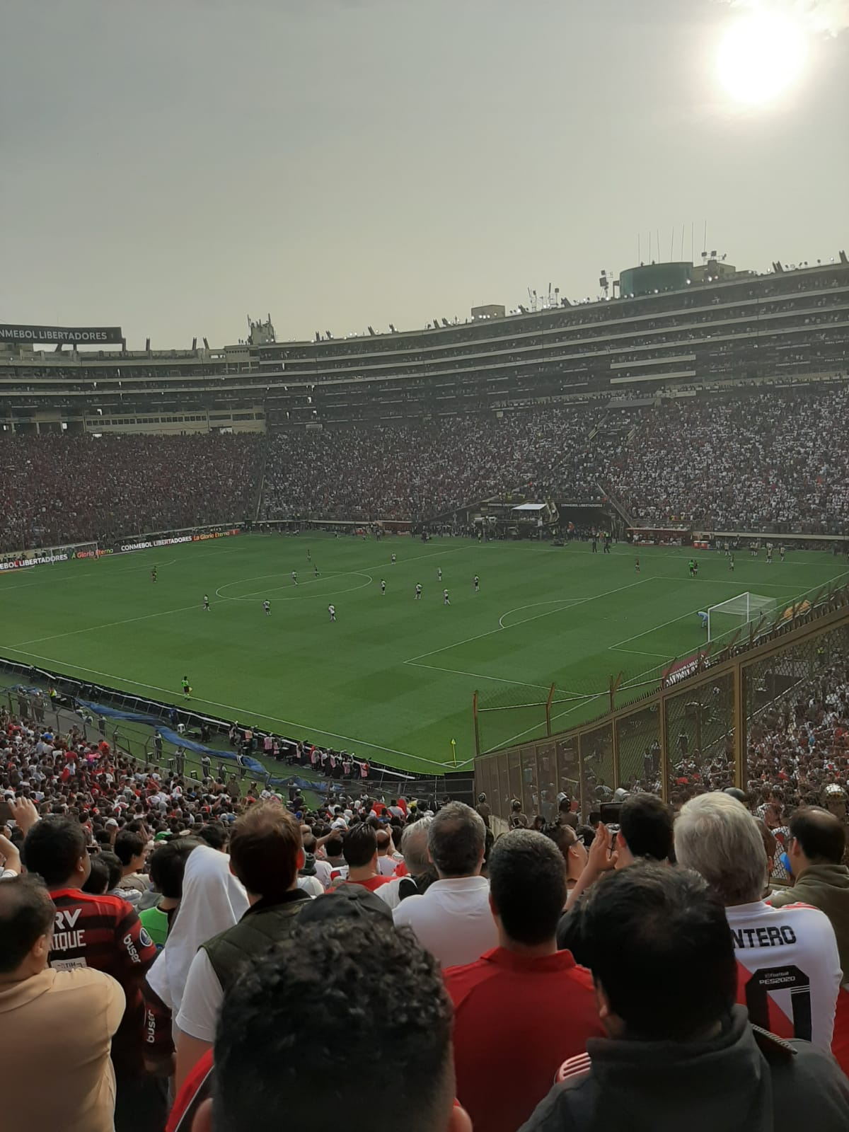 Final de la Copa Libertadores 2019